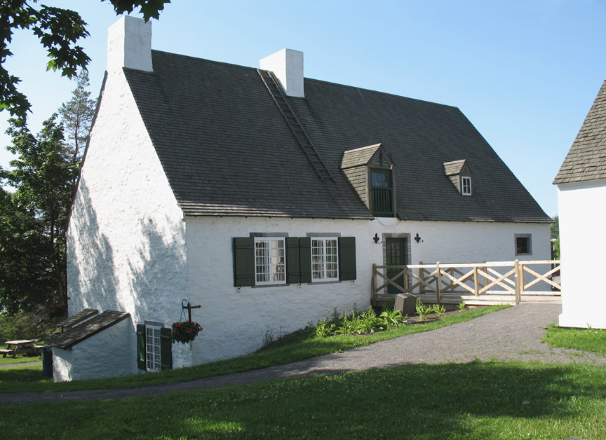 Moulin des Jésuites, Ville de Québec (Québec) Canada. Le Moulin des Jésuites de Charlesbourg est un moulin à eau situé à Québec, à l’est de l'arrondissement historique de Charlesbourg (Trait-Carré). Il a été construit en pierre en 1740 et a cessé de fonctionner en 1940. Il abrite aujourd'hui un centre d'interprétation historique.